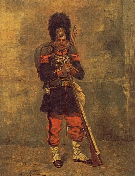 Grenadier Second Empire - Alphonse de Neuville